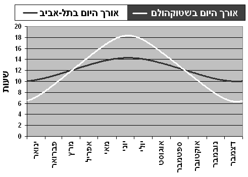 גרף המשווה את אורך היום (מזריחה עד שקיעה) בתל אביב ובסטוקהולם.